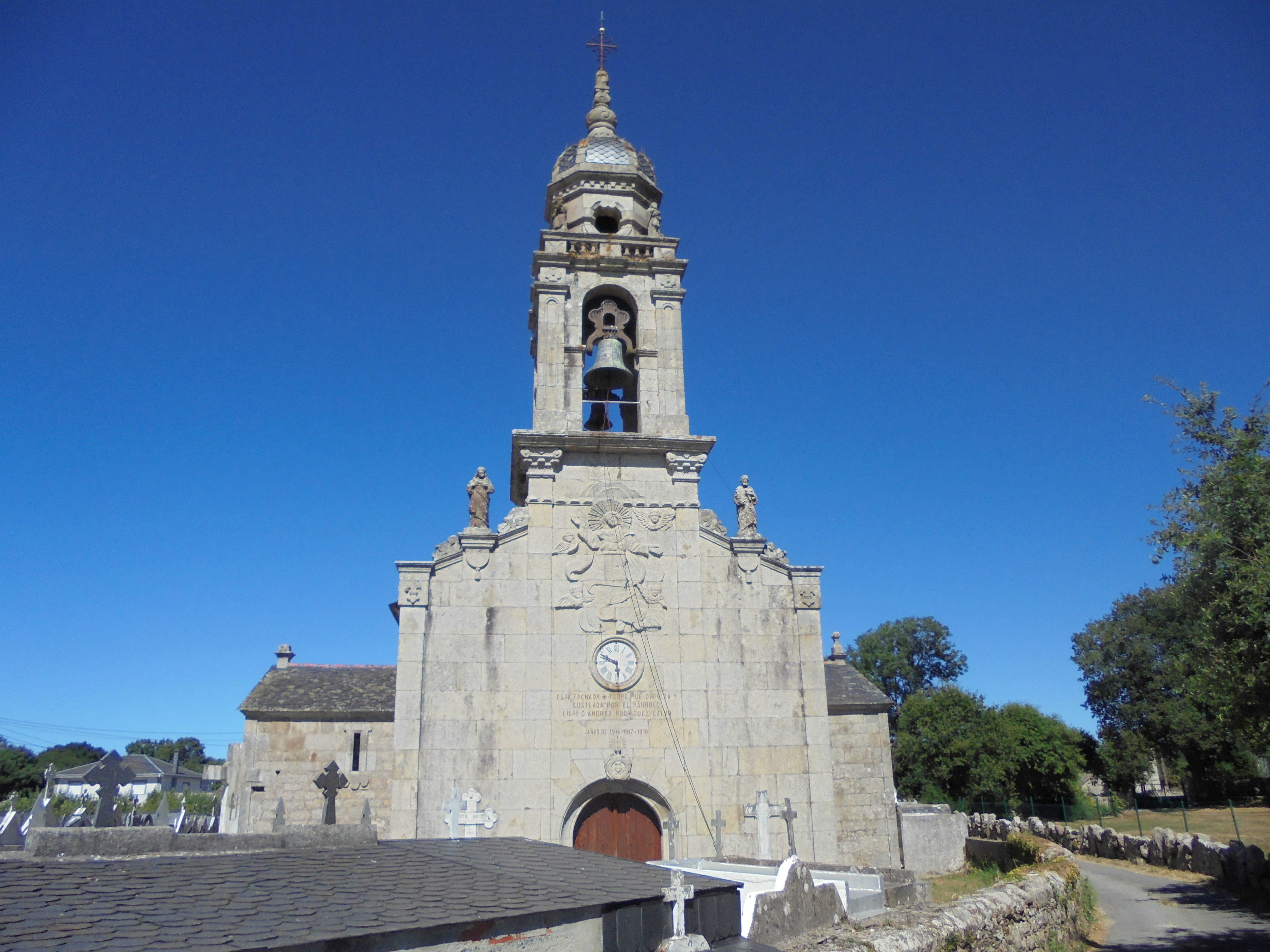 Igrexa parroquial de Santa María de Muxa ( Lugo)